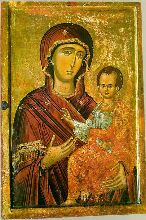 БОГОРОДИЦА СО ХРИСТОС. XVI век. 96 x 62.5 cm. Од црквата на манастирот Св. Јован Претеча, с. Слепче - Демирхисарско. Денес во Музејот на Македонија, Скопје.